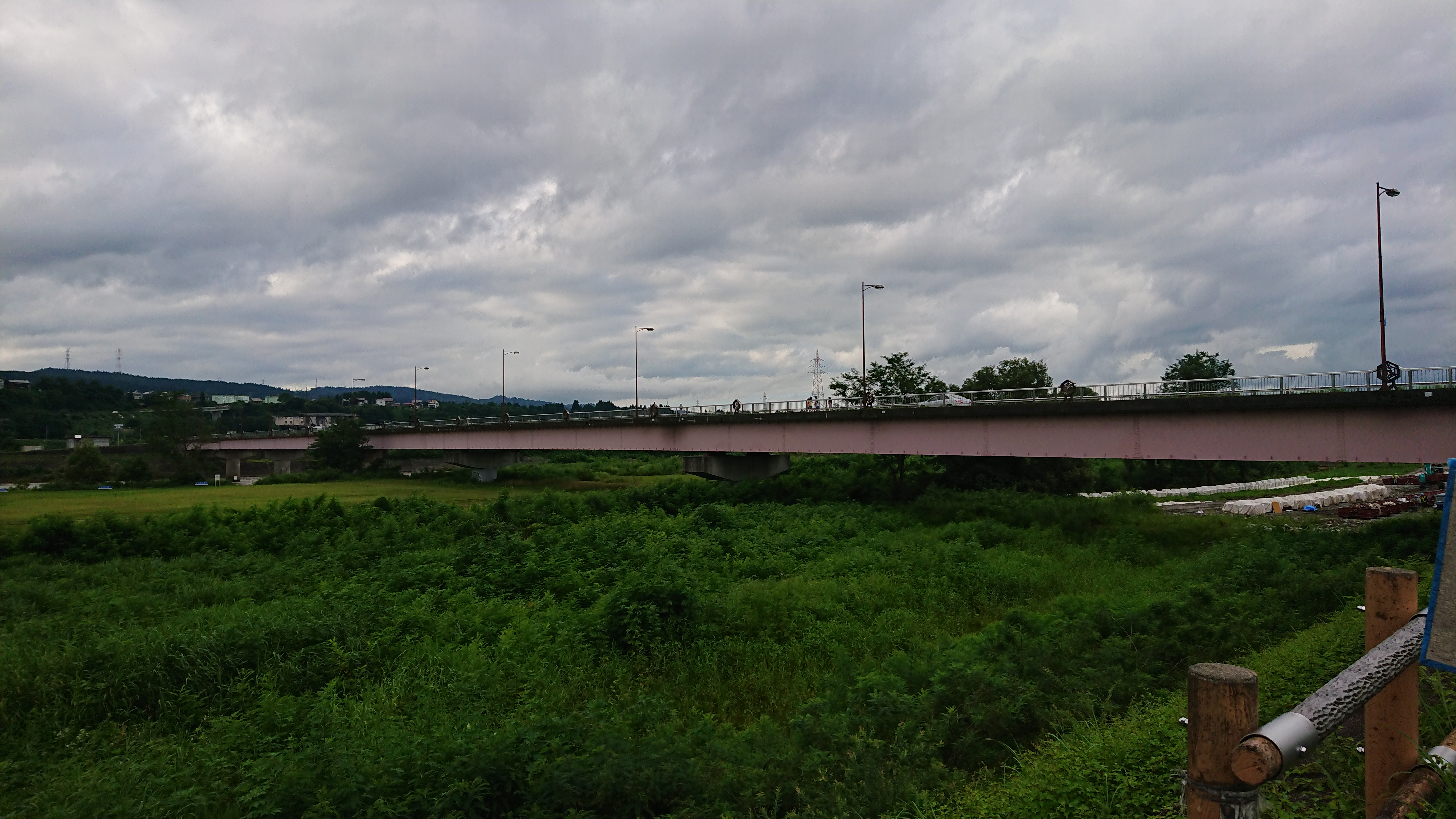 妻有大橋を上流右岸側の堤防より撮影。 新潟県十日町市、2020年7月30日。